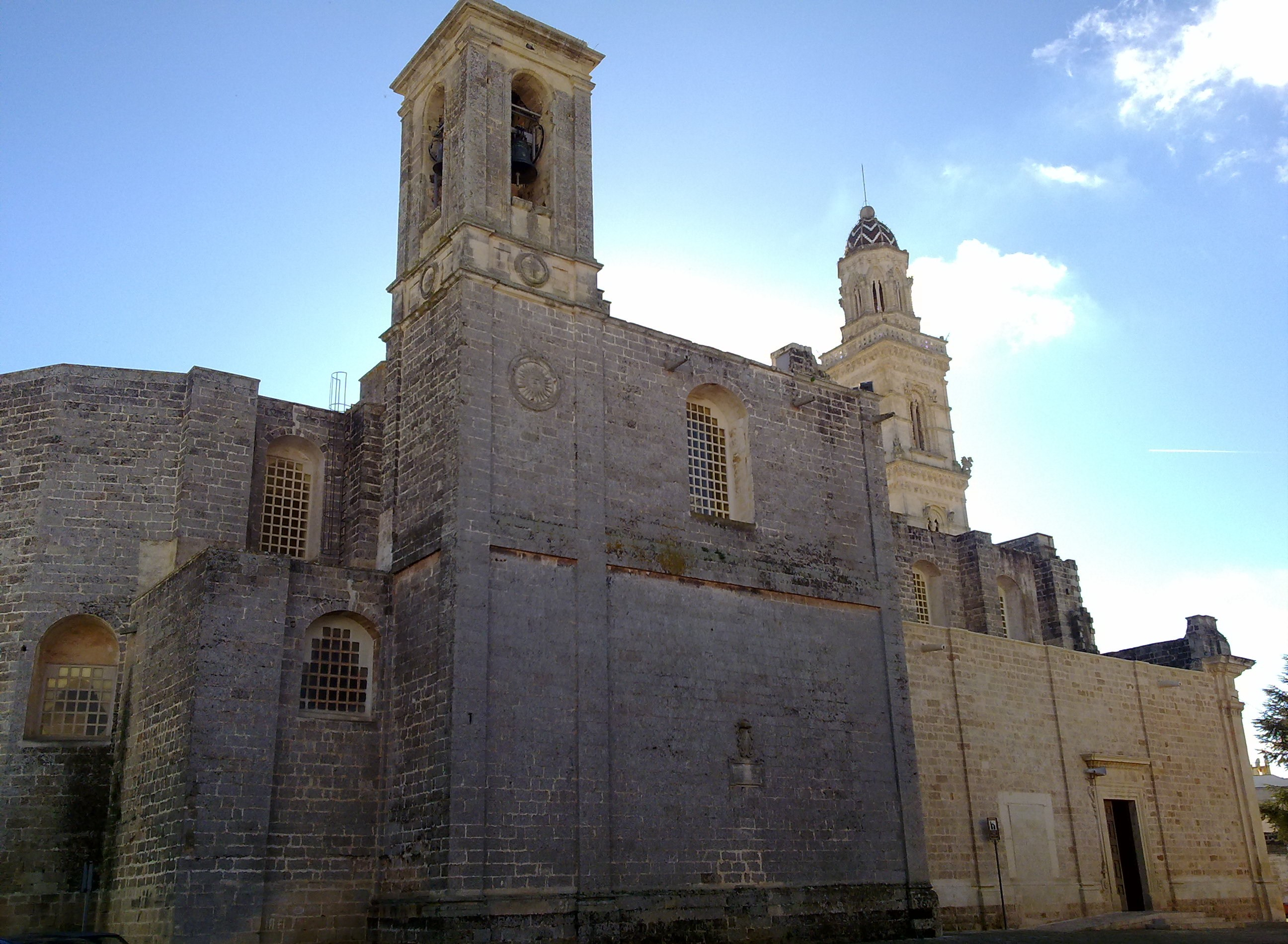 Chiesa madre di Soleto esterno, Lecce